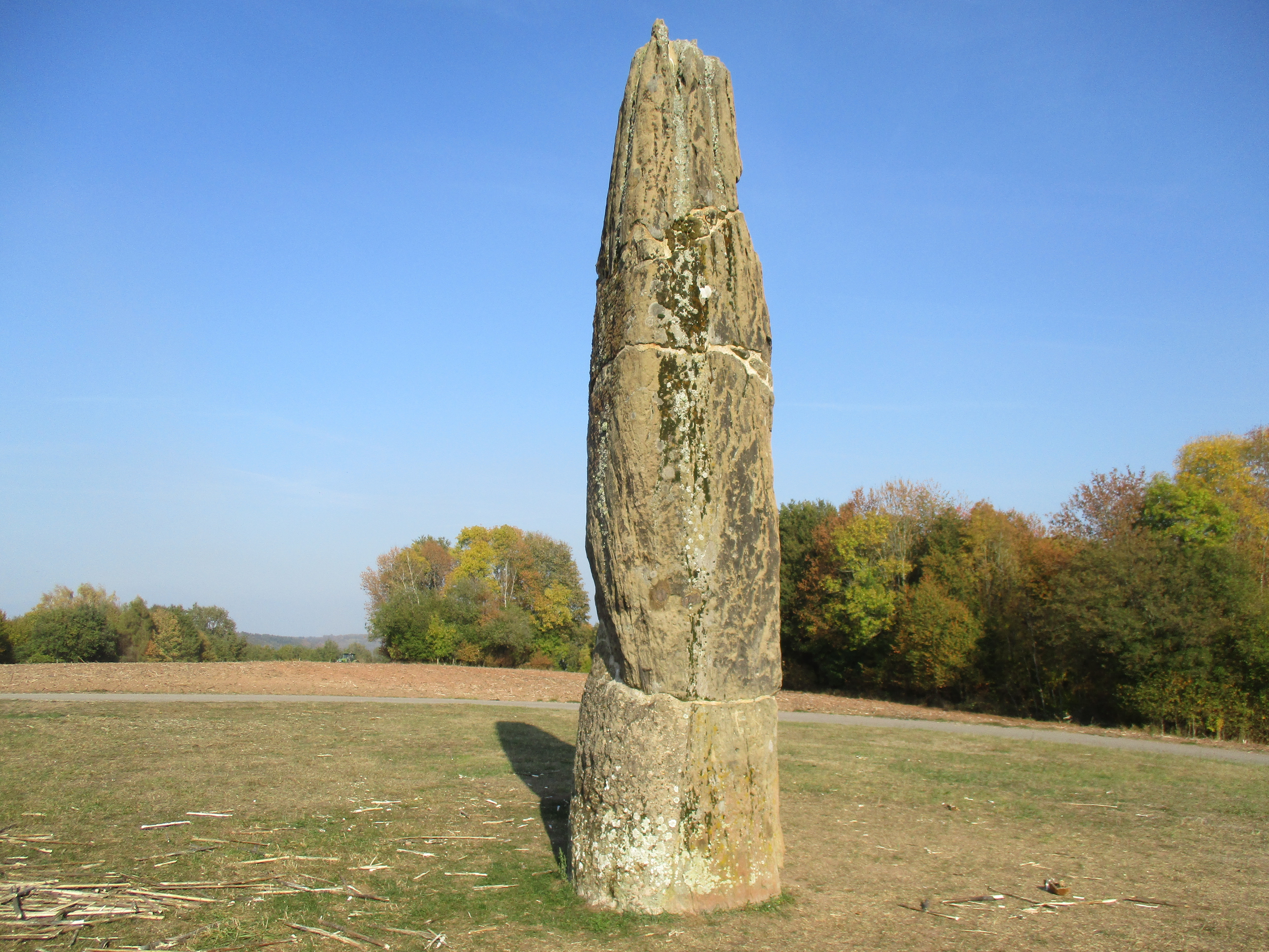 Le menhir du Gollenstein fut renversé à l'automne 1939 de peur d’en faire un repère de tir pour l’artillerie française, il se brisa en quatre morceaux. Il fut réparé et redressé en 1951.